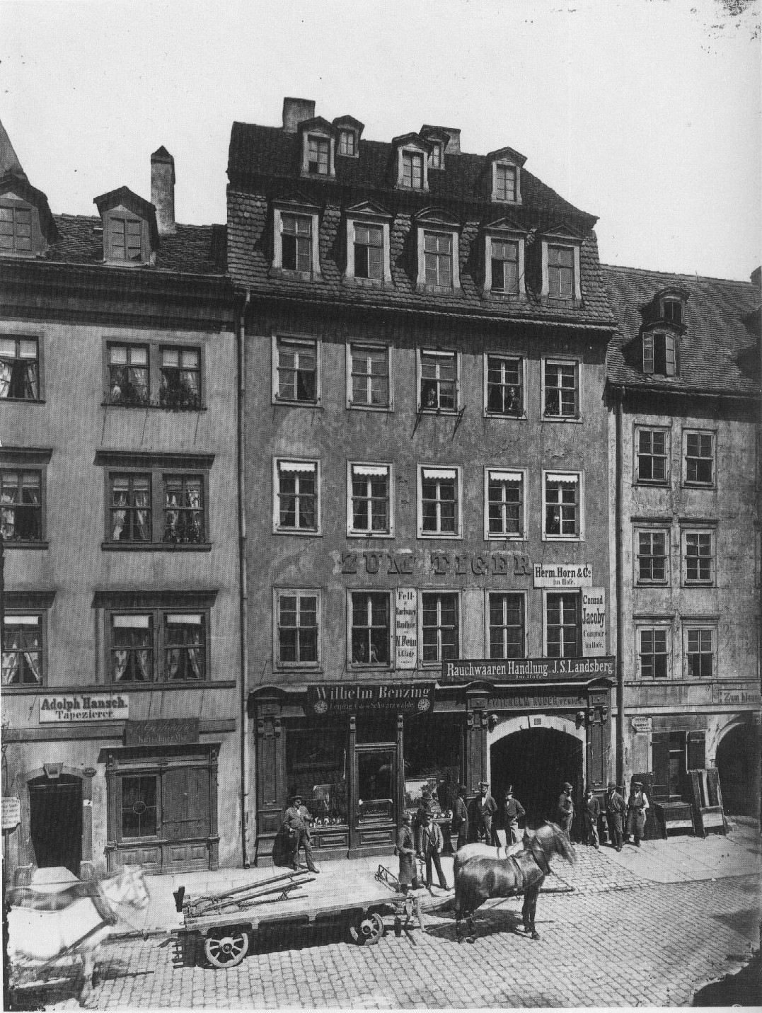 Das Bild zeigt ein ab 1722 erwähntes Barockhaus in Leipzig Brühl Nr. 69, das 1878 einem Neubau weichen musste (Hausname Zum Tiger). Adolph Hansch. Tapezierer ...? Kürschner Mstr. Fell & Rauchwaren Handlung von N. Fein I. Etage Rauchwaaren Handlung J. S. Landsberg im Hofe Conrad Jacoby Comptoir im Hofe Herm. Horn & Co im Hofe Wilhelm Ruder & ...? Zum blauen ...?